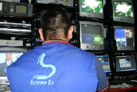 Fotografía de operador del control master del canal Buena TV en San cristóbal, estado Táchira.